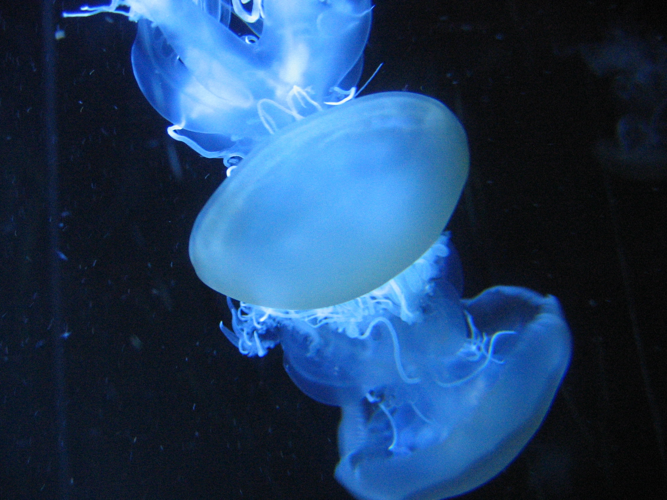 Mangrovenqualle (Cassiopea andromeda) ???